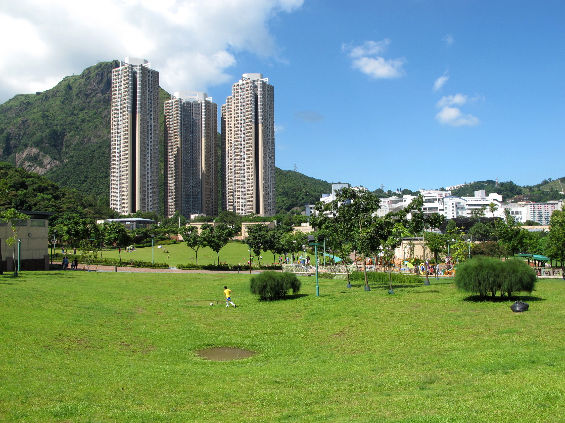 Jordan Valley Park 佐敦谷公園